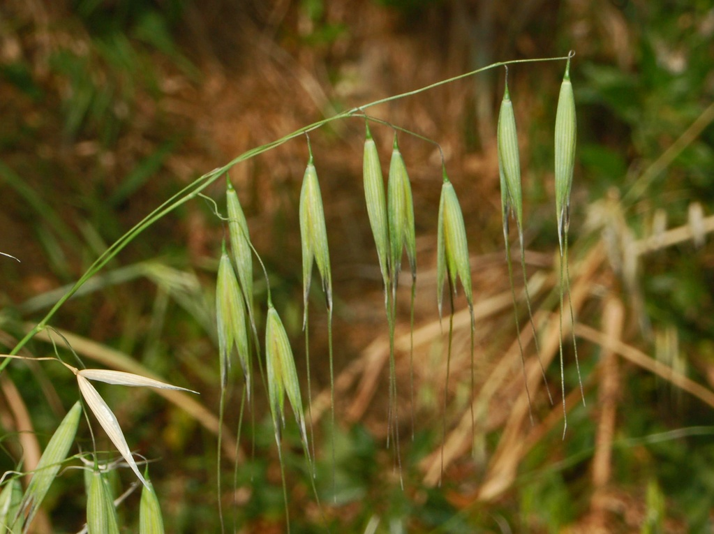 Poaceae - Avena barbata